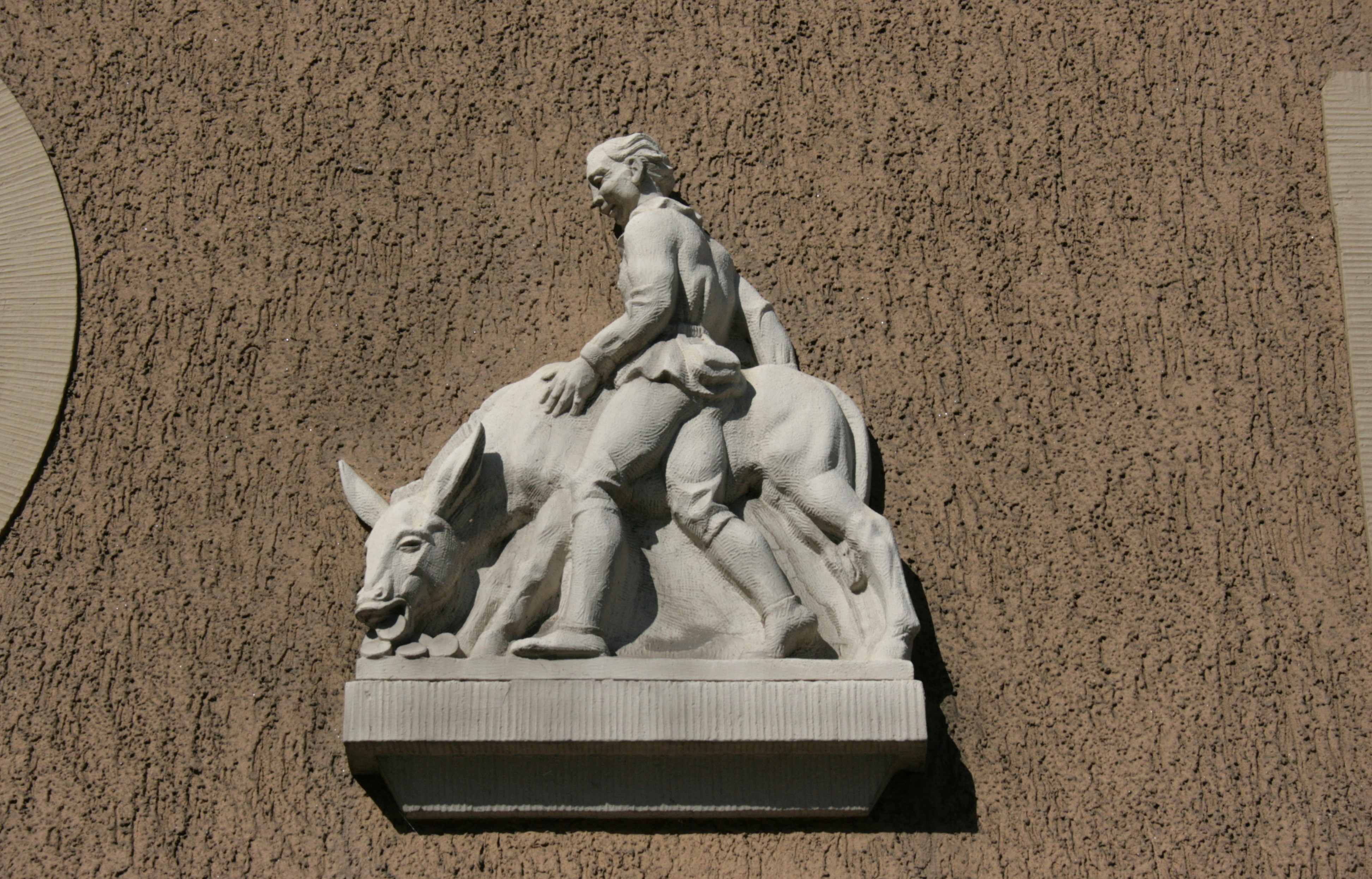 Hauptstraße in Schirgiswalde